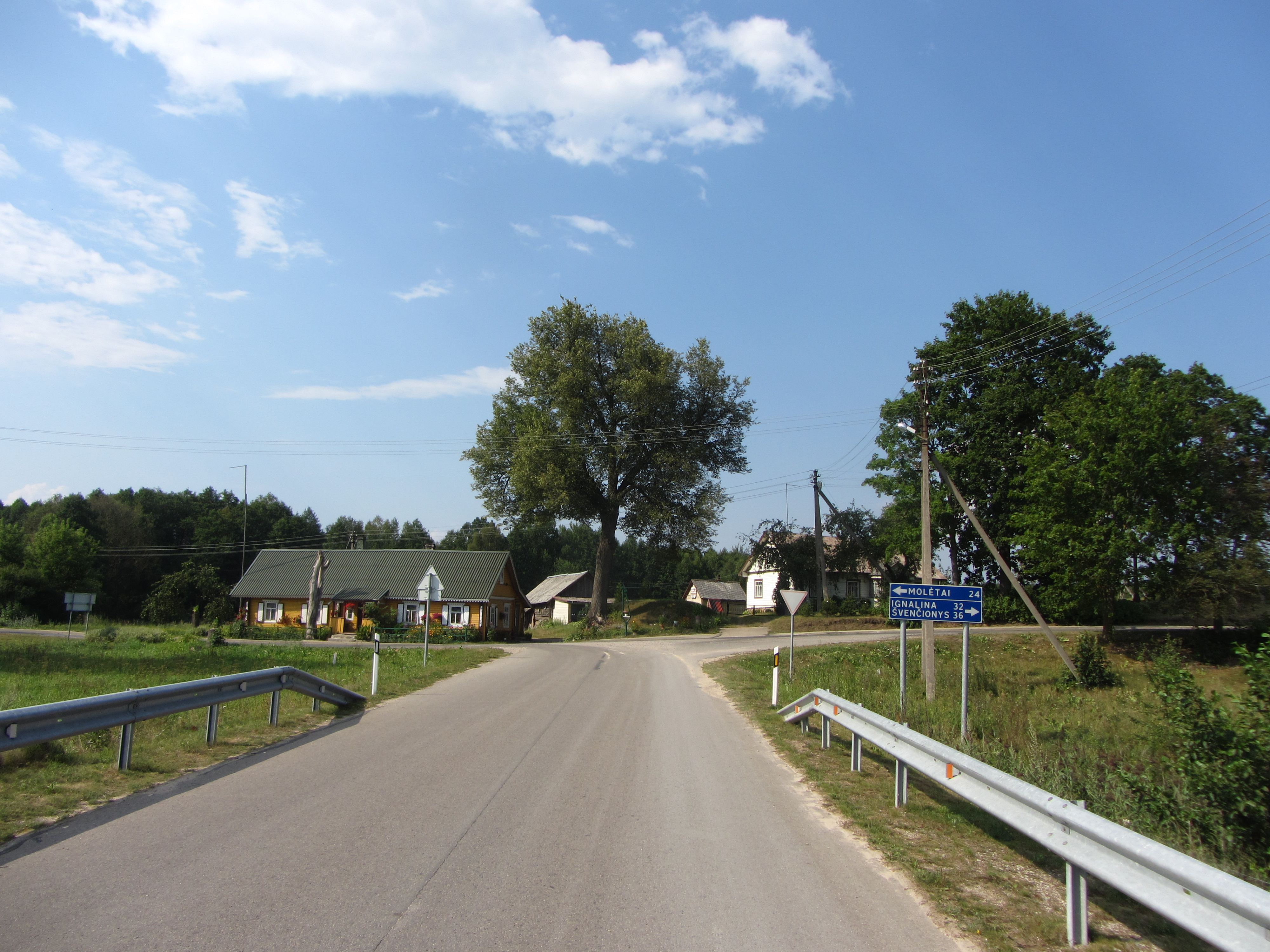 Labanoras, Lithuania